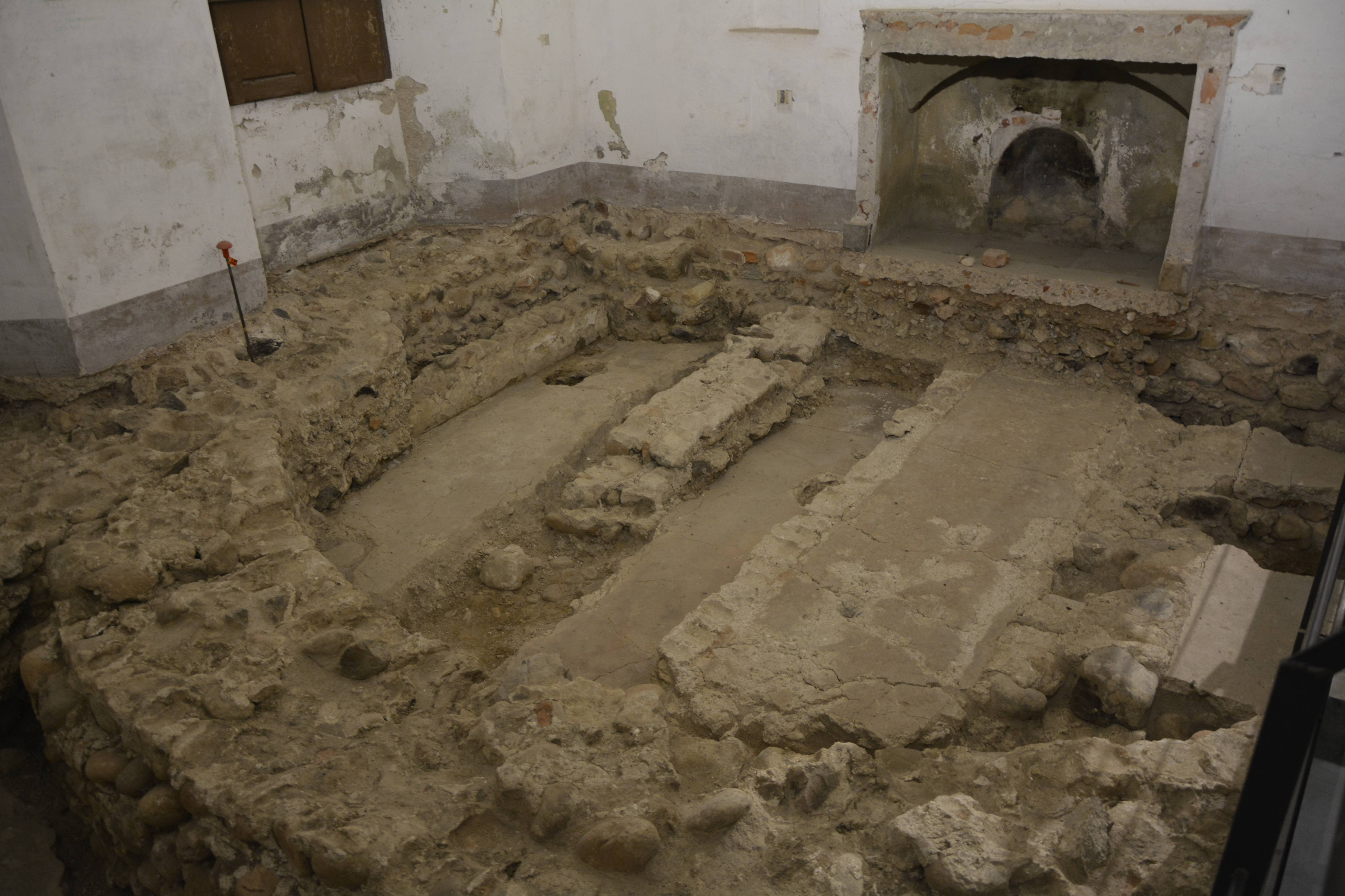 I resti dell'abside della chiesa all'interno del monastero di Cairate, in provincia di Varese.